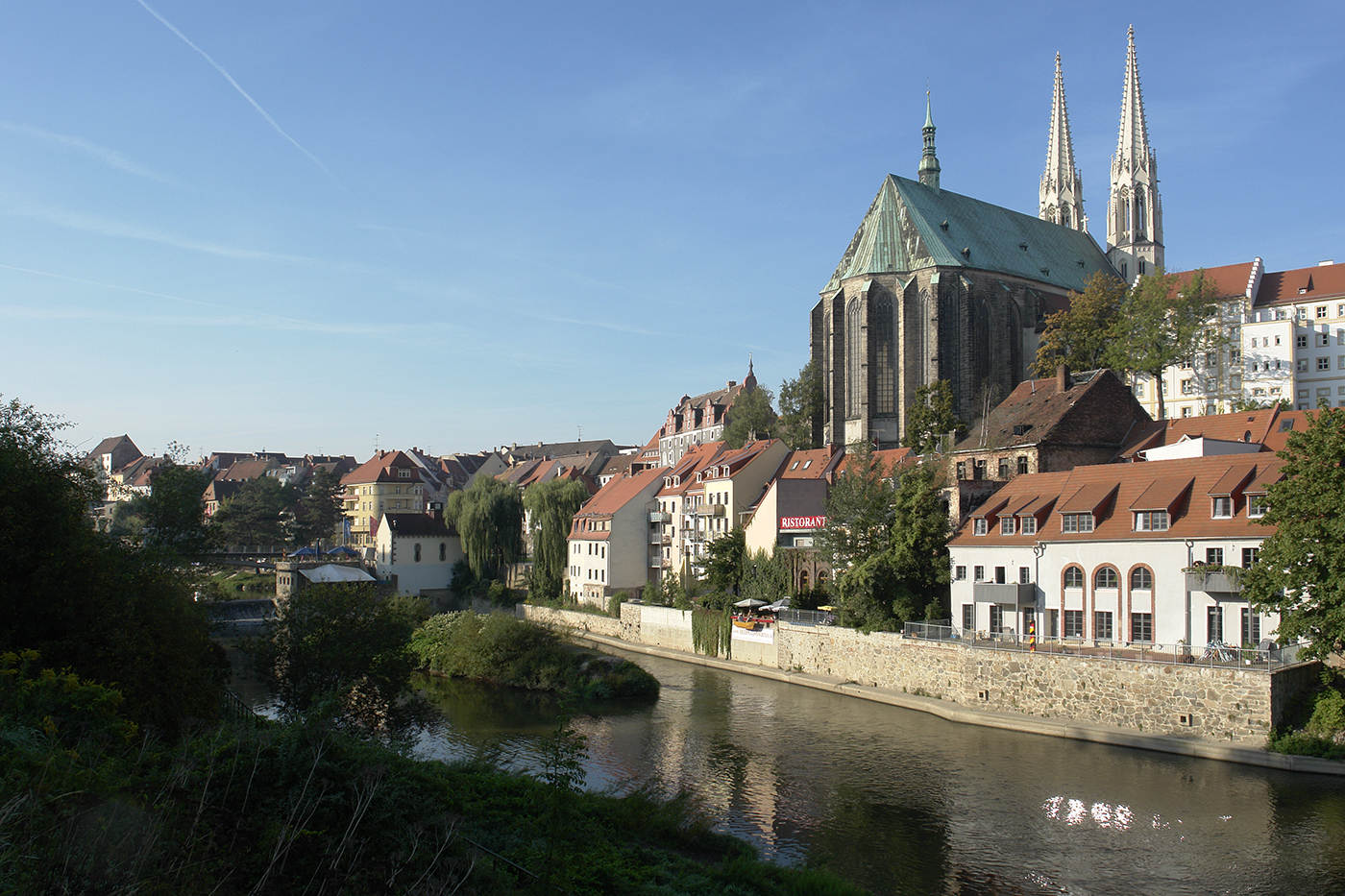 Goerlitz, Neisseufe, St Peter und Paul